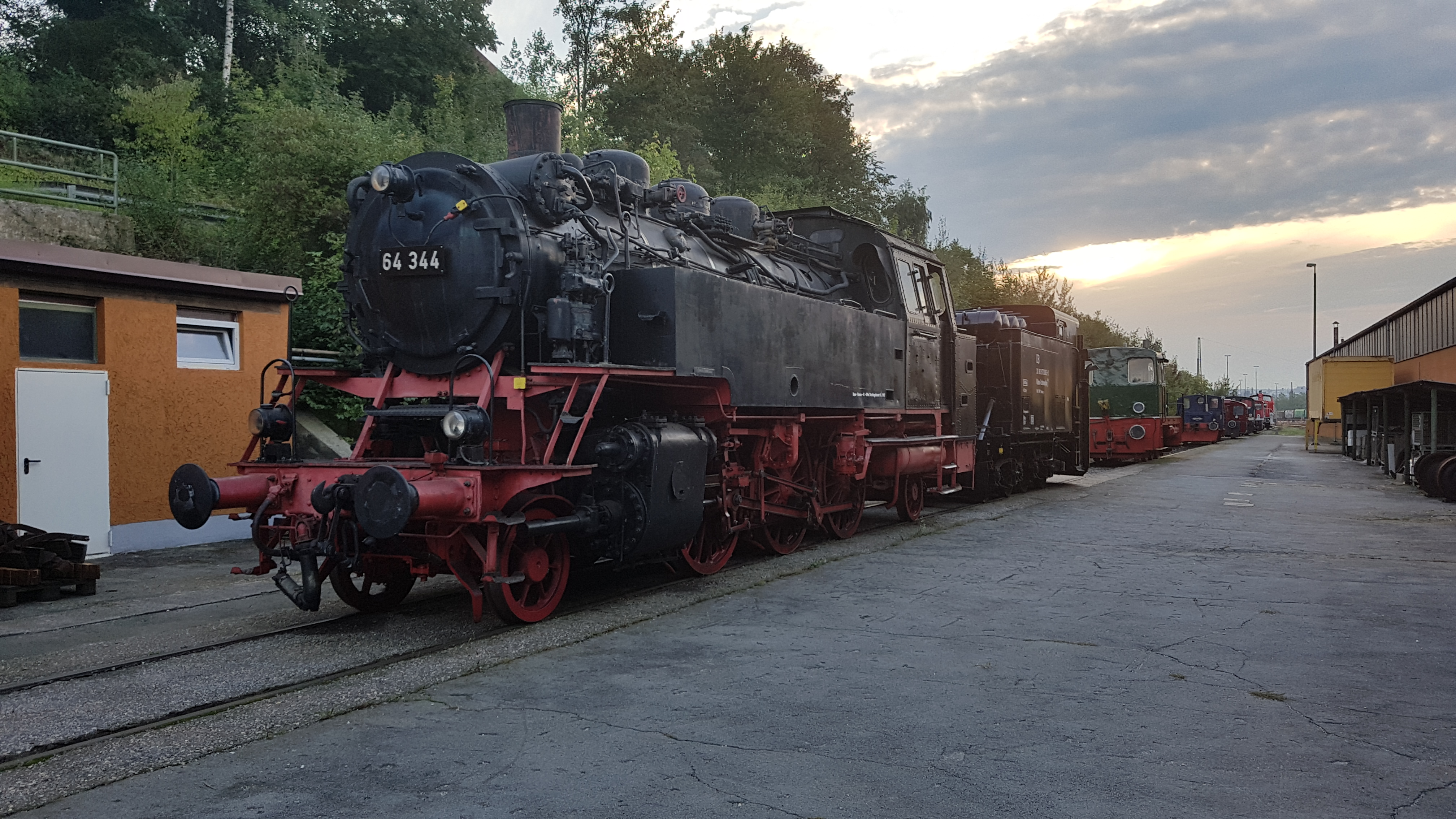 Baureihe 64 der Passauer Eisenbahnfreunde